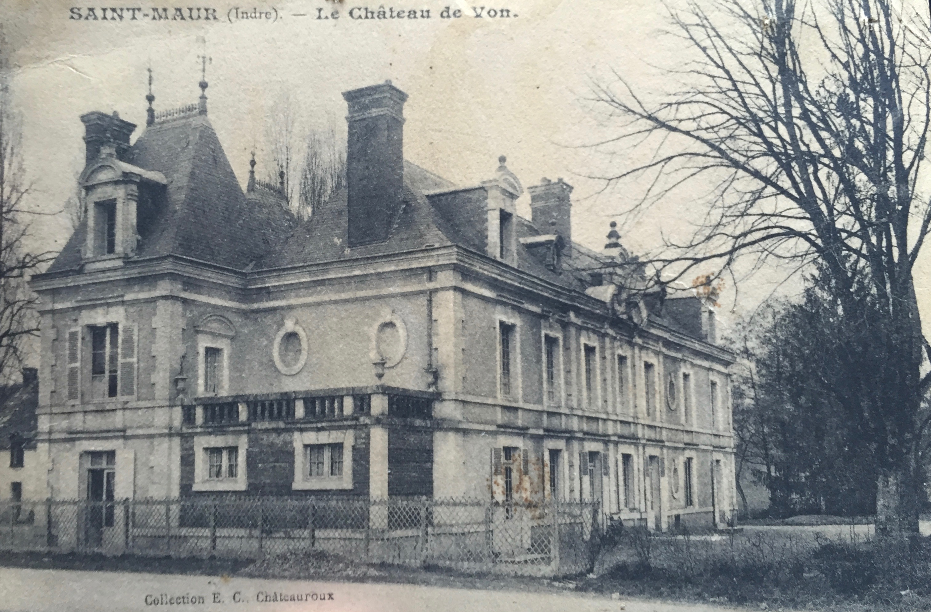 Château de Von - Saint-Maur (Indre), près de Châteauroux. Famille Parthon de Von